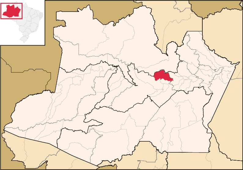 Amazonas - Município de Caapiranga (2016)